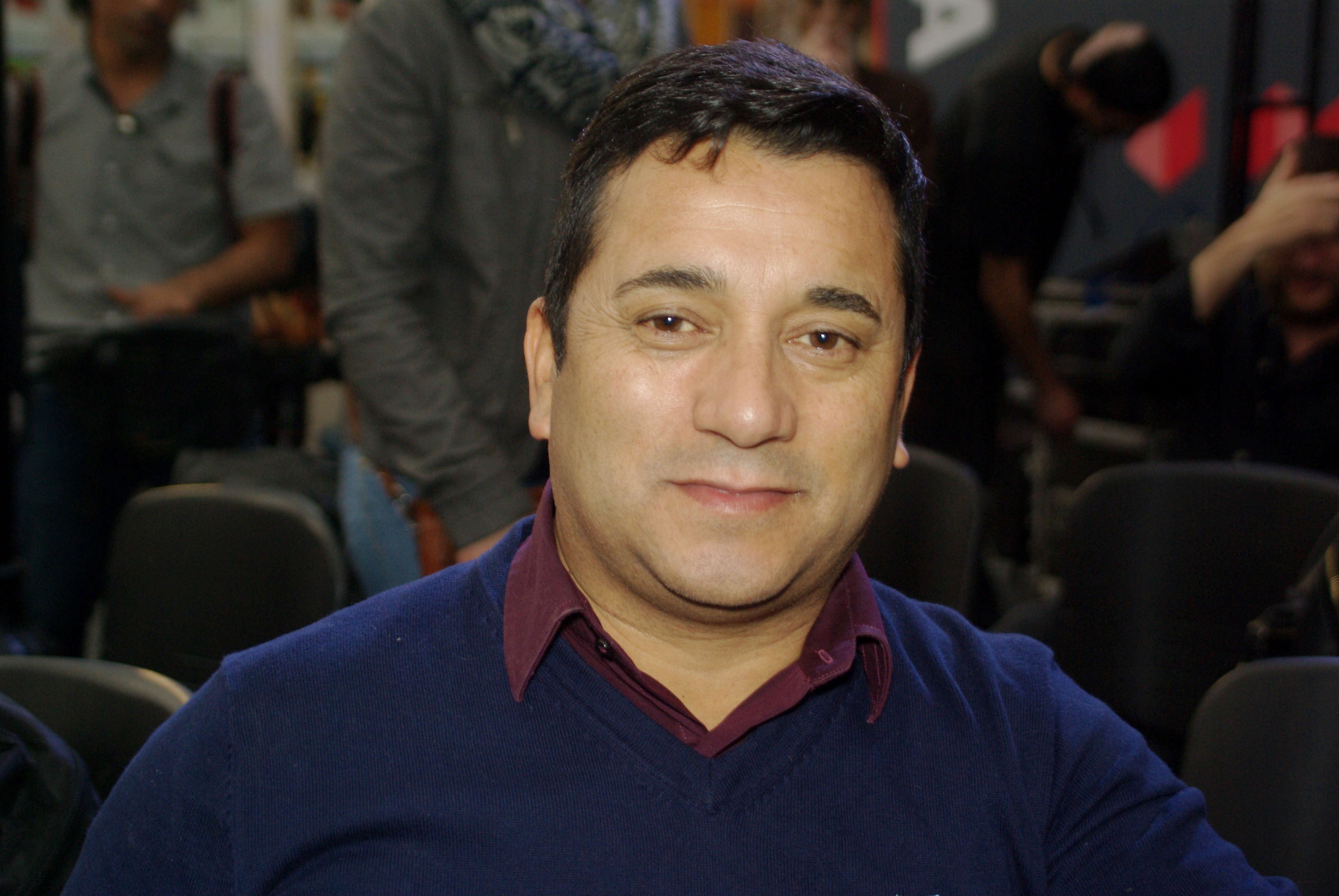 El sindicalista chileno Cristián Cuevas en la Feria Internacional del Libro de Santiago 2015